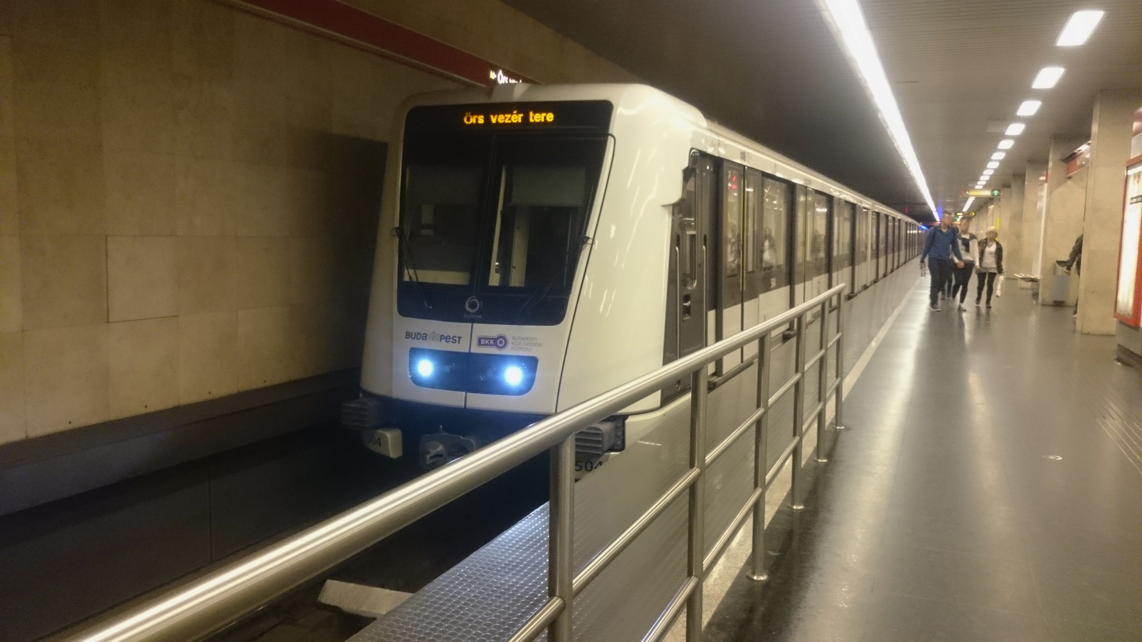 Alstom Metropolis AM5-M2 típusú metrószerelvény a Puskás Ferenc Stadion állomáson